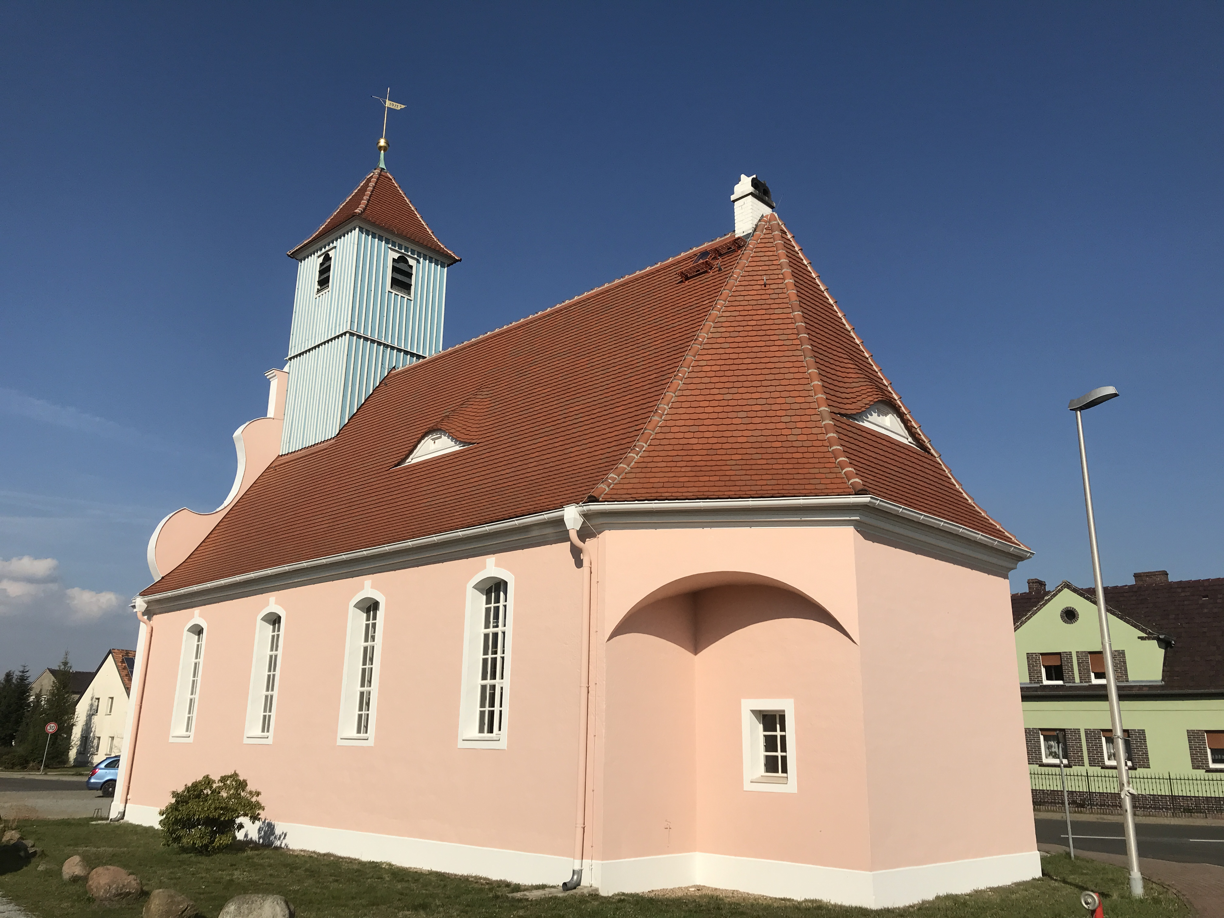 Die Dorfkirche in Döbbrick ist eine Saalkirche aus dem Jahr 1911, die in Neorokoko-Formen errichtet wurde.